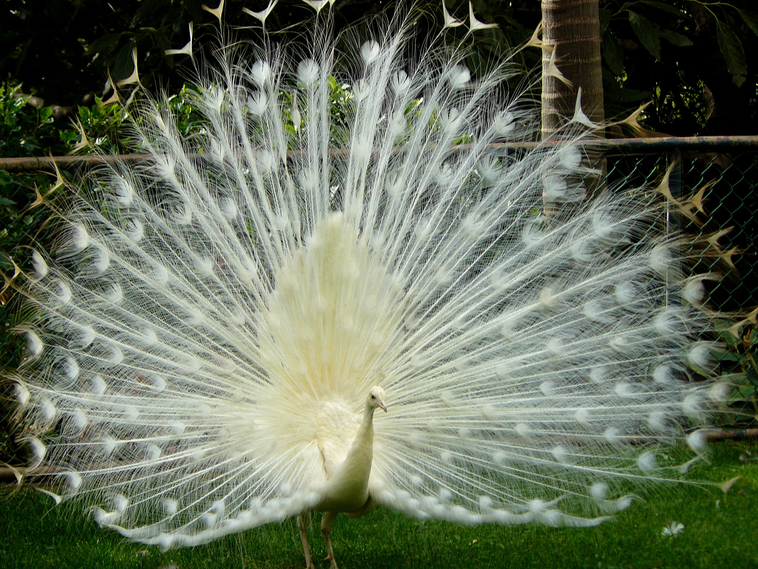 Pavo cristatus mut. alba